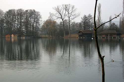 Sursee: Morgenstimmung am See